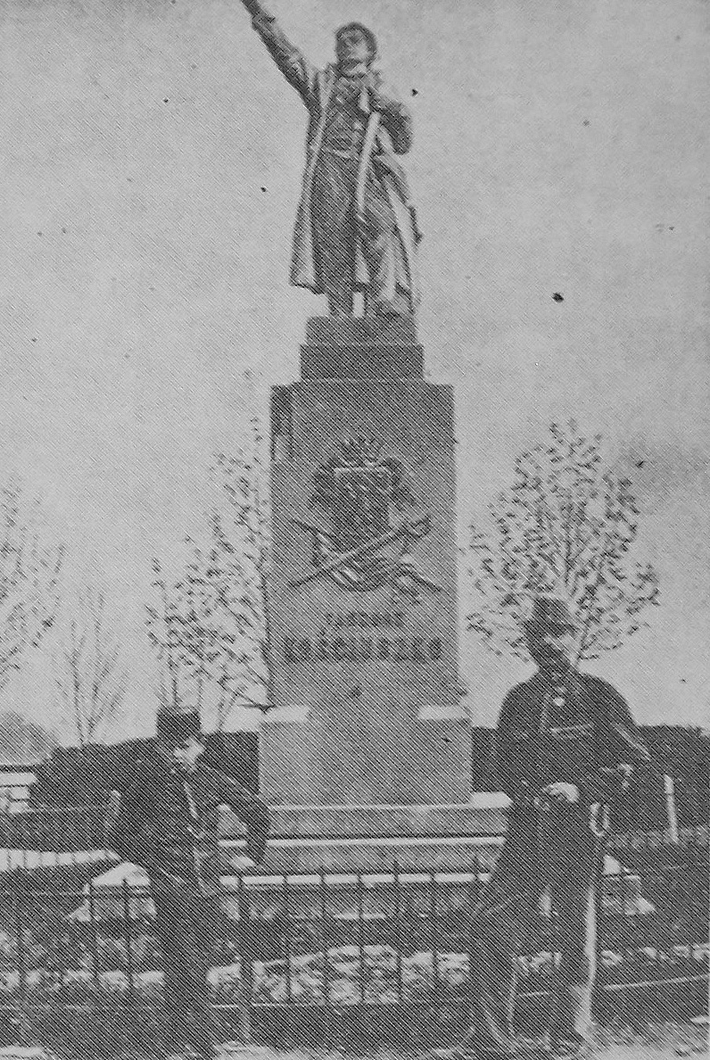 Franciszek i Antoni Bielakowie przed Pomnikiem Tadeusza Kościuszki na pocztówce z 1904